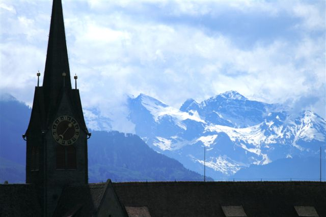 Chloschter Kappel z Kappel am Albis, Schwiiz